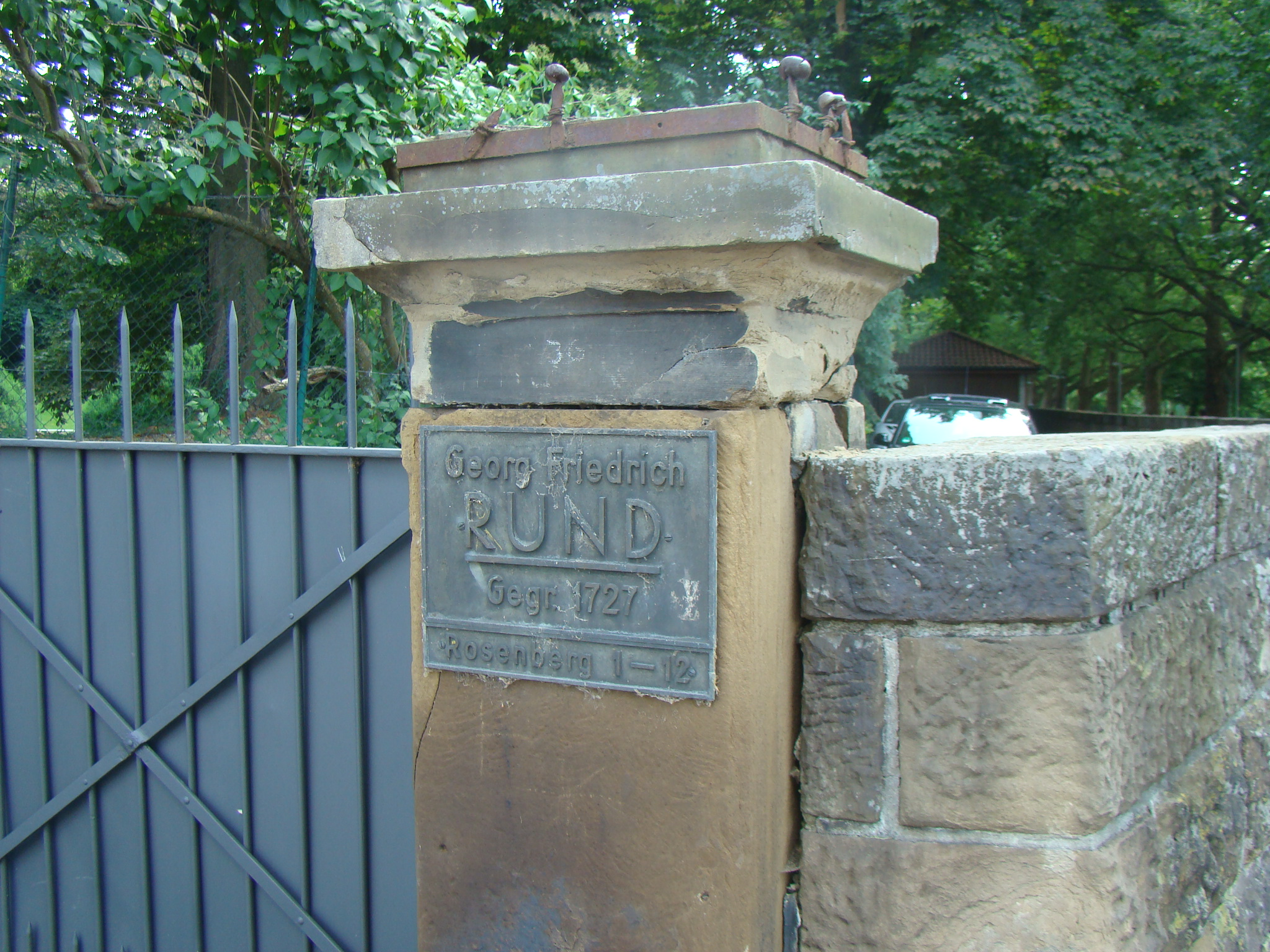 Schild der Fa. G. F. Rund bei der Villa Mertz in Heilbronn